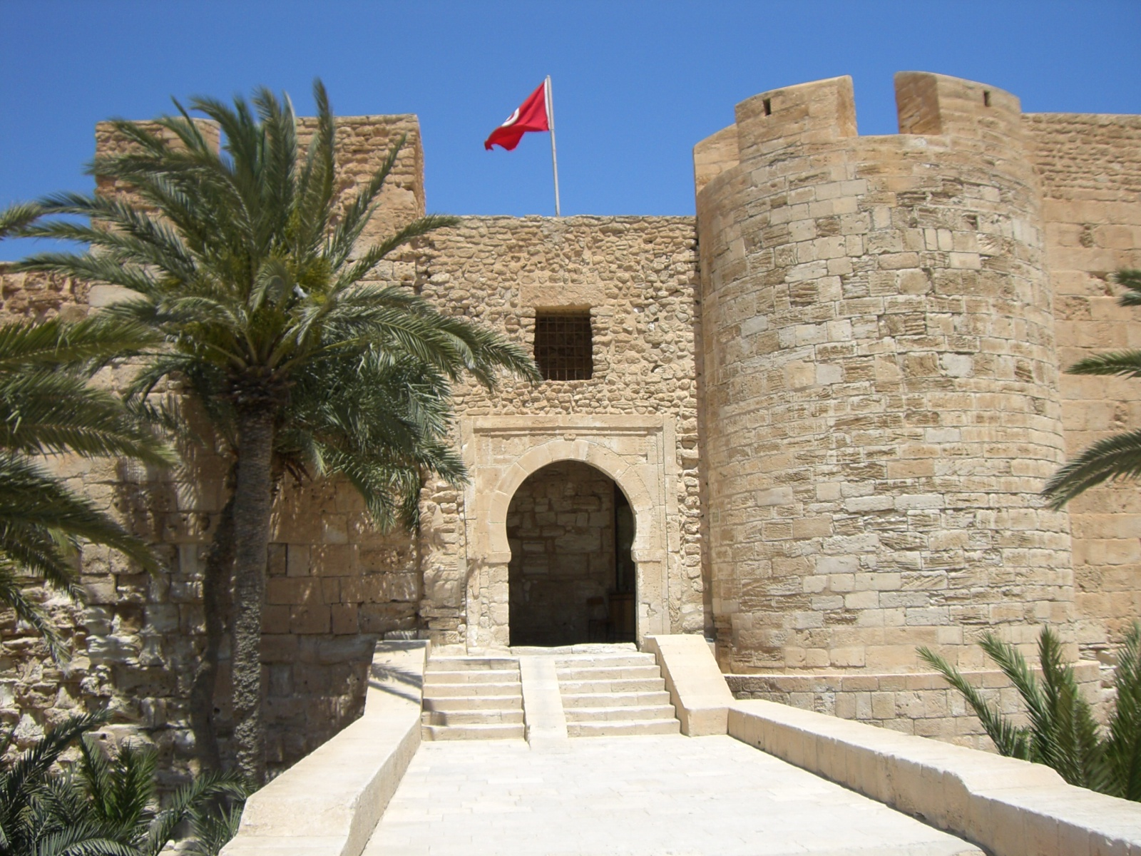 Borj Ghazi Mustapha / Tunisia